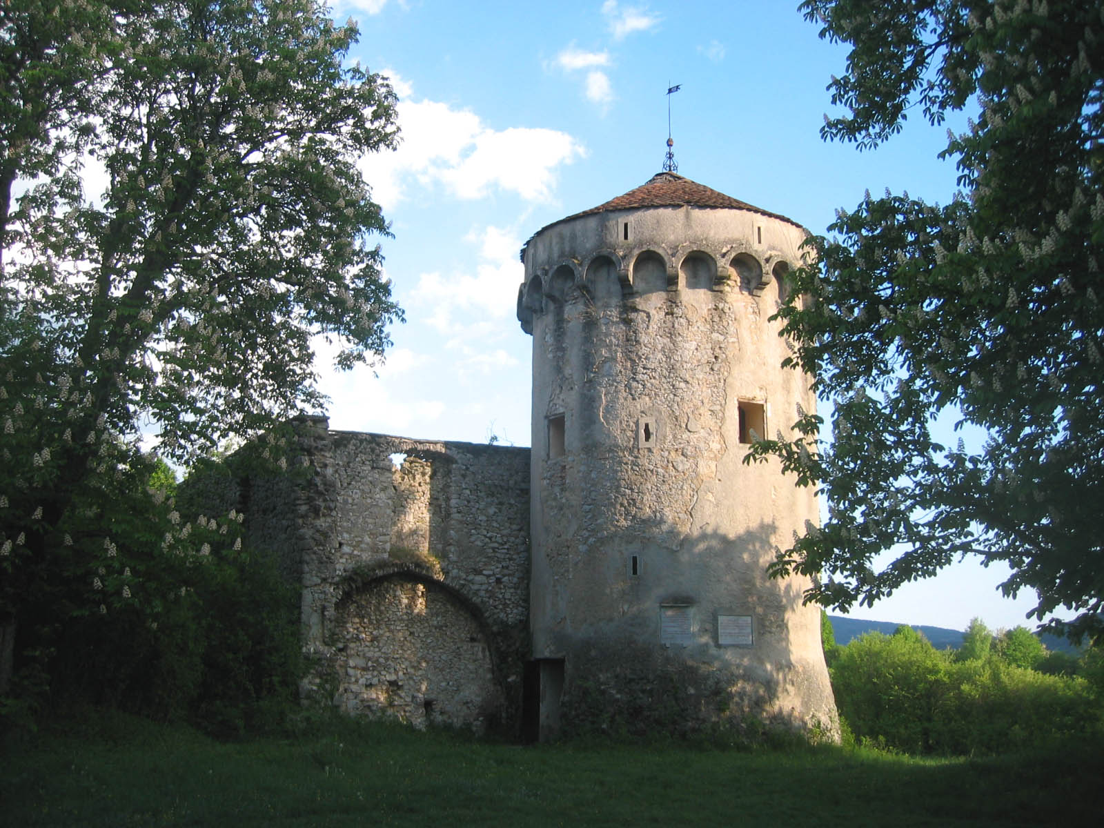 Castle Kalec, Slovenia (Pivka valley)